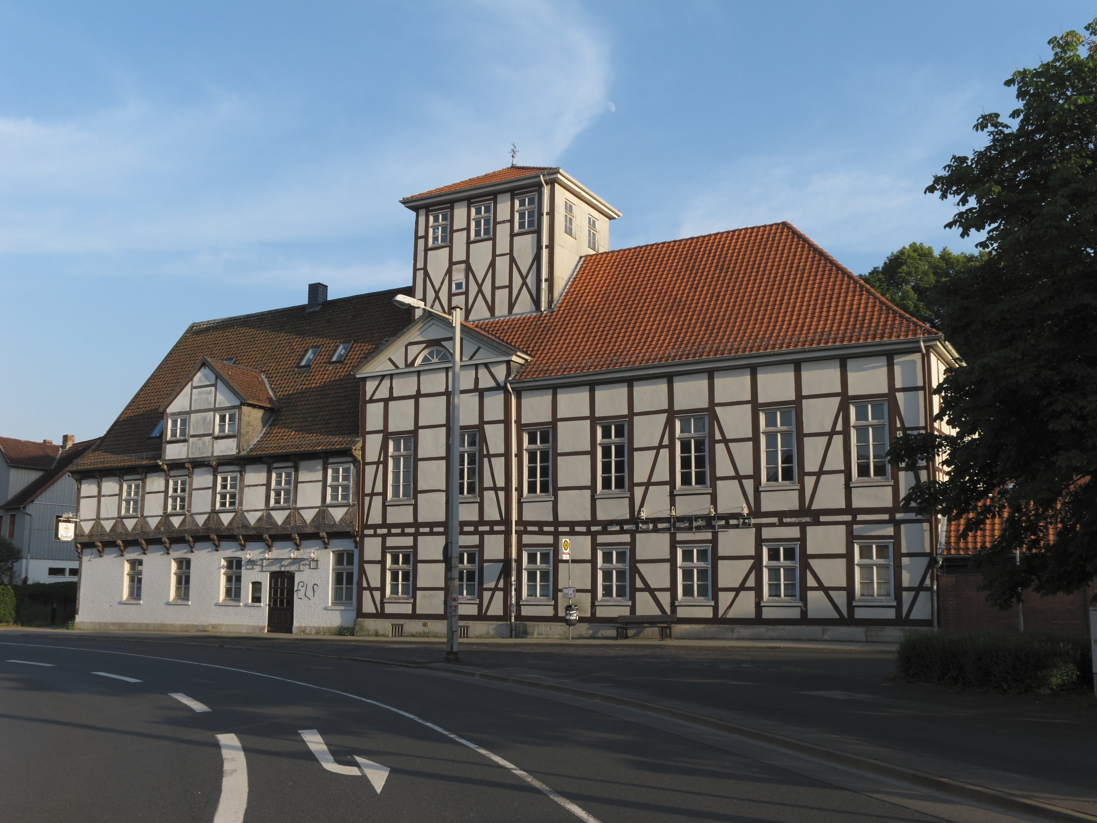 Braunschweig, Ölper Turm